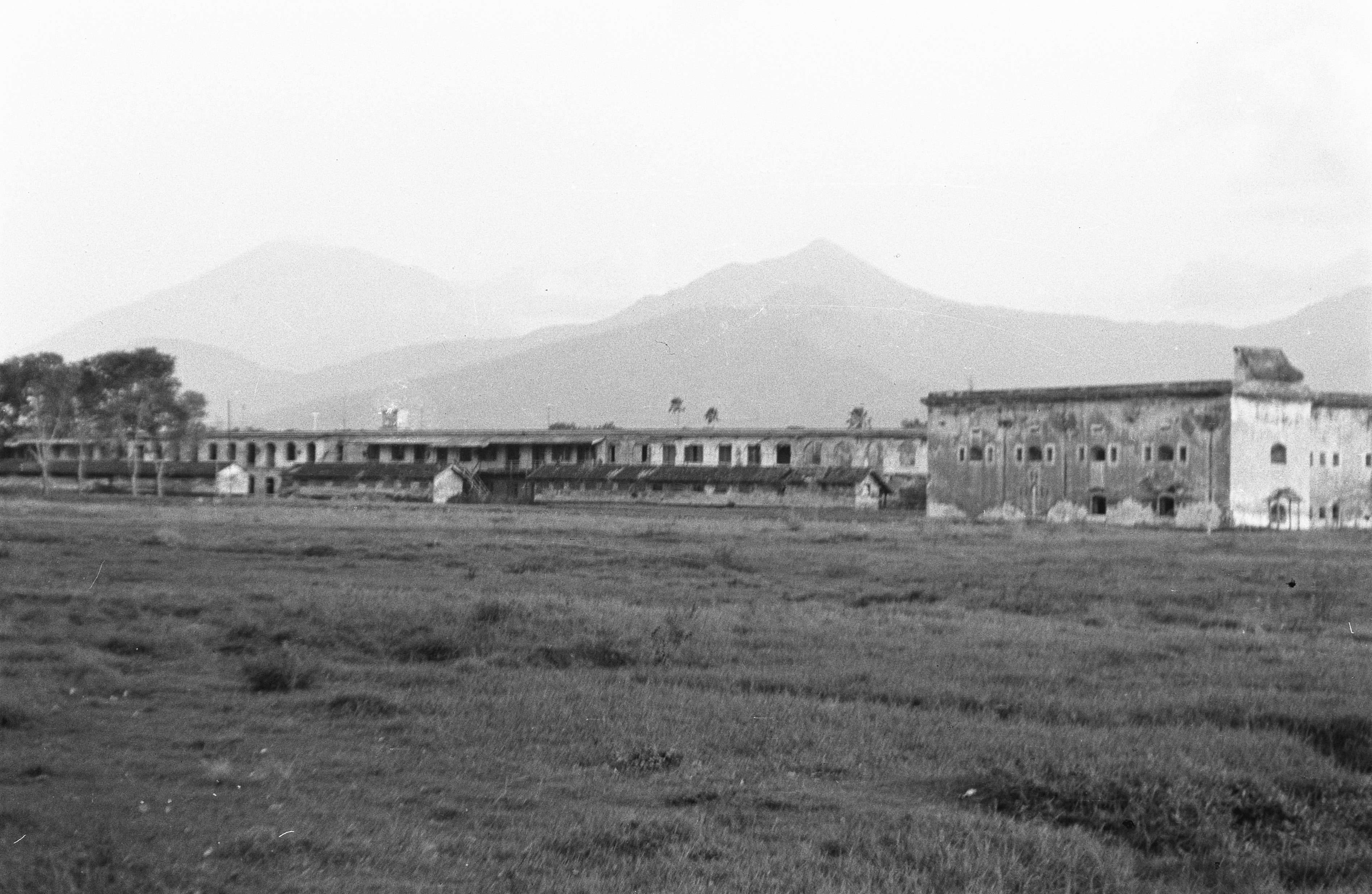 Collectie / Archief : Fotocollectie Dienst voor Legercontacten Indonesië Reportage / Serie : [DLC] Ambarawa Beschrijving : Ambarawa-sector 28-7-47. Het oude fort Willem I te Ambarawa Datum : 28 juli 1947 Locatie : Ambarawa, Indonesië, Java, Nederlands-Indië Fotograaf : Fotograaf Onbekend / DLC Auteursrechthebbende : Nationaal Archief Materiaalsoort : Negatief (zwart/wit) Nummer archiefinventaris : bekijk toegang 2.24.04.02 Bestanddeelnummer : 1676